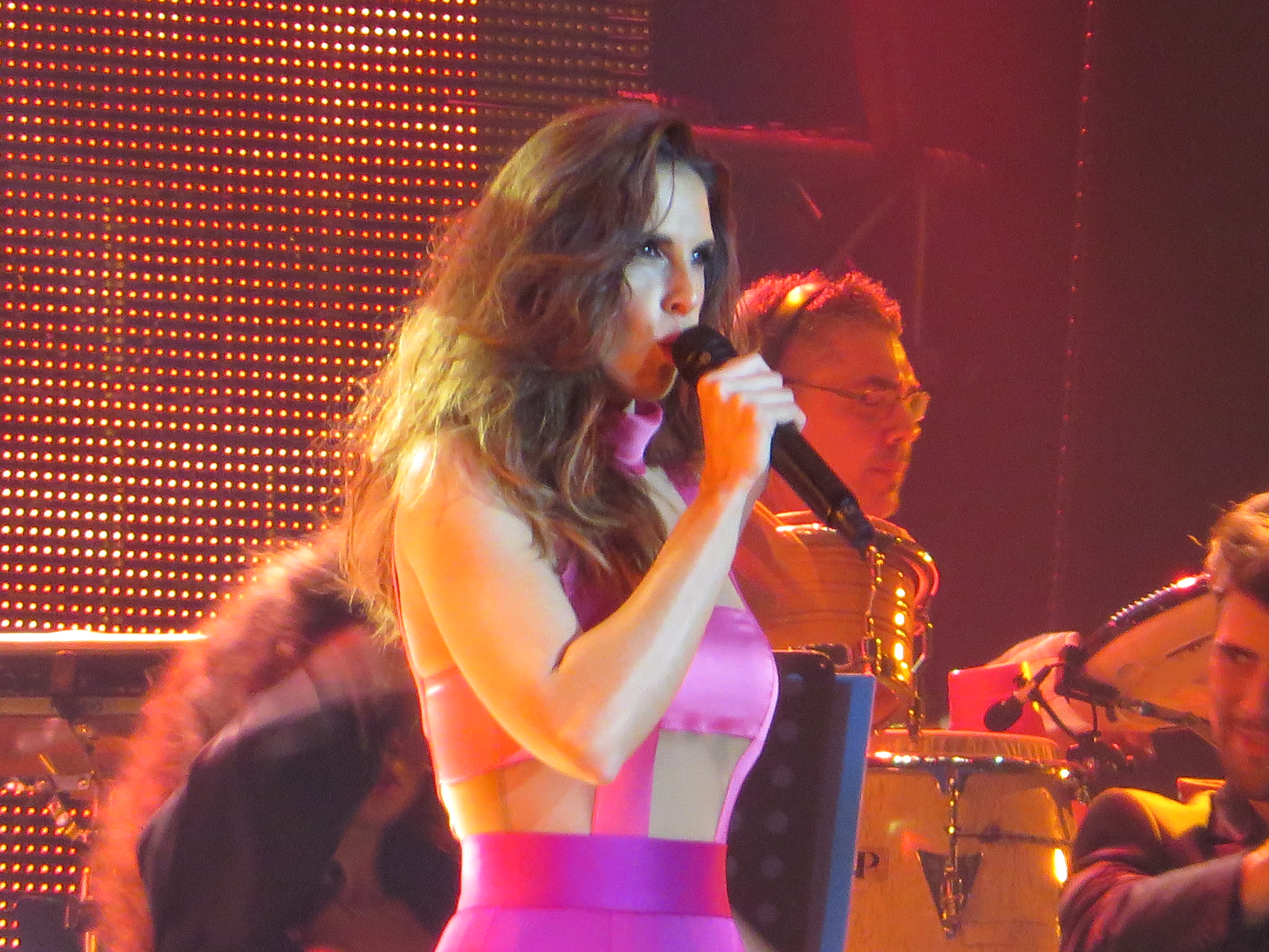 Actuación de Nuria Fergó en el concierto conmemorativo del 15 aniversario de OT en el Palau Sant Jordi de Barcelona (31-10-2016)